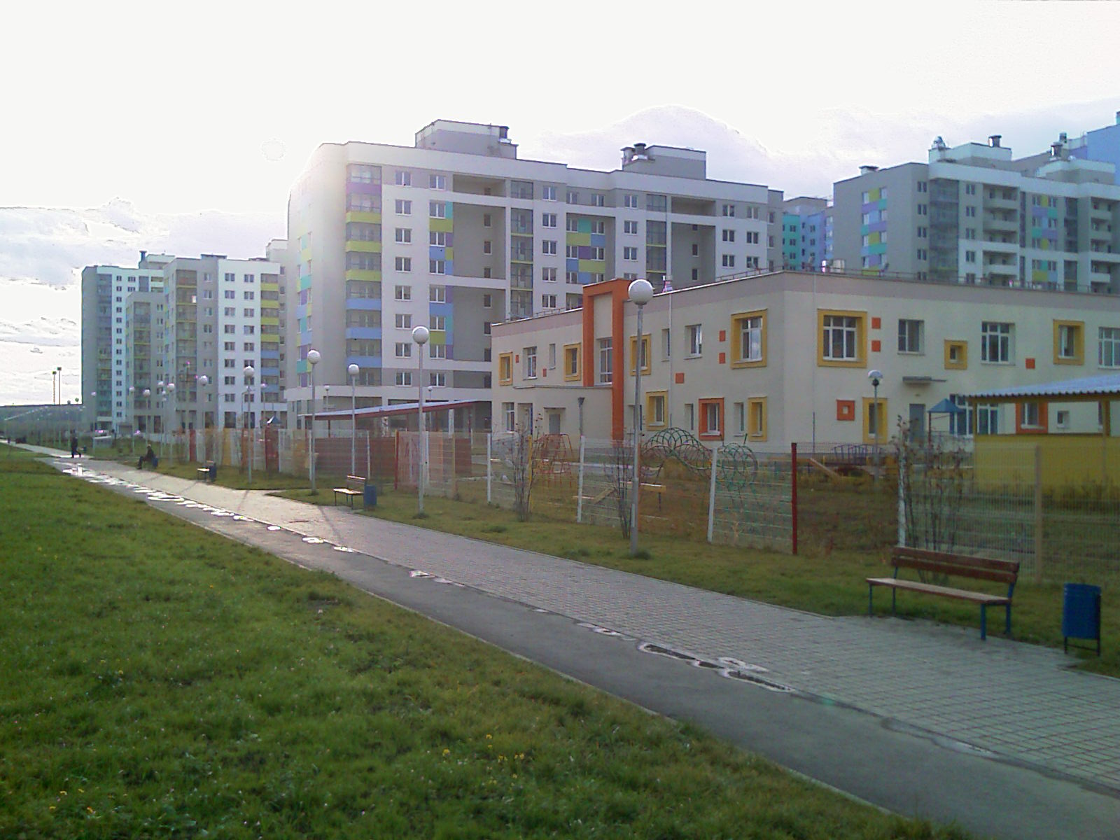 Kindergarten in Akademichesky